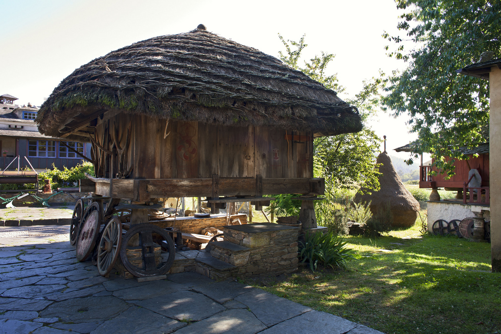 El hórreo se levantó en el Museo con las piezas de una panera arruinada propiedad de la casa Gómez, de Berducedo (concejo de Allande). La panera original fue obra del magnífico carpintero maestro Campos, original de Allande, y del que al menos se conocen cuatro de sus obras fechadas entre los años 1859 y 1874. Tres de las corondias, colondras o tablas que hacen de pared de la caja principal de hórreo y que están junto a la puerta, presentan decoración y leyenda: tetrasquel coronado y “FVEHECHAPORD. / MANUEL GOMEZ / AÑO DE 1874” esfera de reloj, flor de lis y “EL / MAESTRO CAM / POS.” y finalmente, lazo y “REFÉZOLO / PAHORRO” y por debajo “MANVEL MONTESERIN /AÑO 1991”. La costumbre de firmar las paneras y decorarlas con motivos geométricos comienza a fines del siglo XVIII. Estas decoraciones talladas constituyen una de las manifestaciones más ricas del arte popular de la zona. La reconstrucción de este hórreo fue llevada a cabo por el carpintero Manuel Monteserín, de Grandas de Salime, en el verano de 1991. Debe dedicarse una mención especial a la cubierta de teito de uz (brezo) y paja de centeno, ya que este tipo, tan común en otro tiempo en la zona y muy valorado por los campesinos por sus cualidades para la conservación de los alimentos, hoy es muy raro porque ya no se cultiva el centeno, ni quedan gentes que dominen el arte de teitar como antaño. Ethnographic Museum of Grandas de Salime Native nameMuseo Etnográfico de Grandas de SalimeLocationGrandas de Salime, Asturias , (Spain)Coordinates43° 13′ 03.9″ N, 6° 52′ 28.4″ W Established1986Web page control : Q2879455 VIAF: 262007074 LCCN: n98032370 BNE: XX254091 WorldCat institution QS:P195,Q2879455